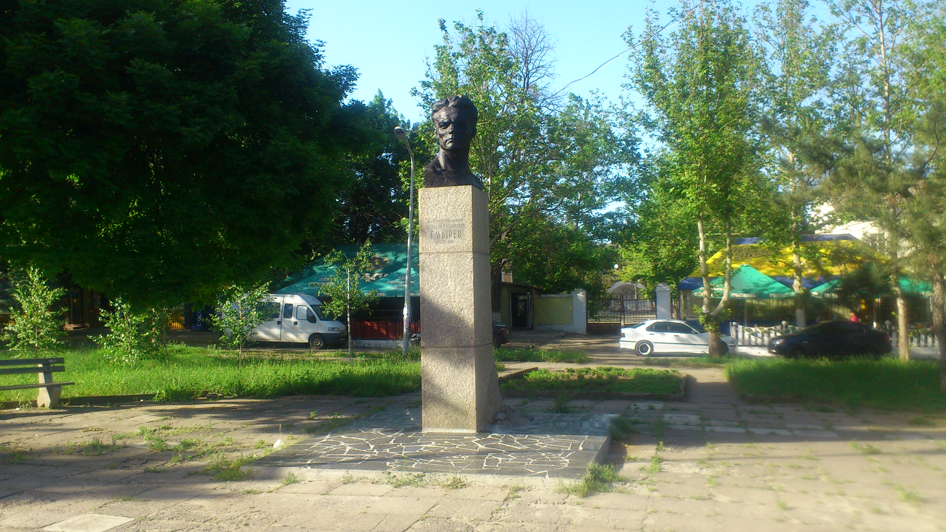 Погруддя Олексію Гмирьову у Миколаєві, 2014 рік